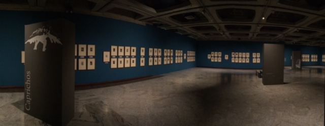 Exposición Goya: La mirada inconforme en el Complejo Moderno del Museo de Bellas Artes.